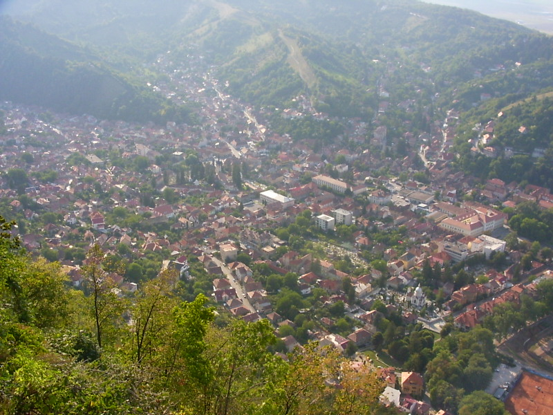 Şchei/Bolgárszeg/Obere Vorstadt seen from Tâmpa/Zinne/Cenk